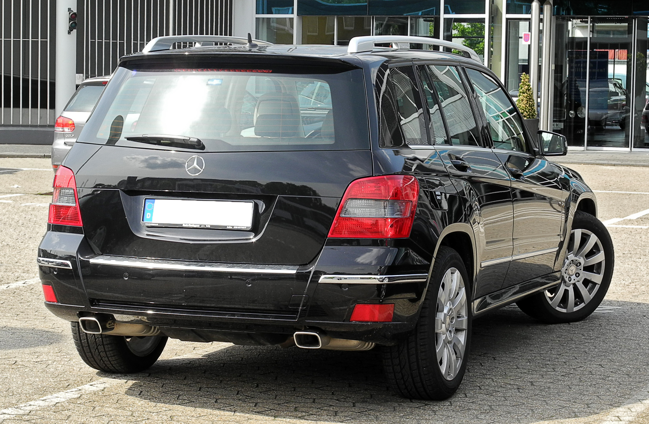 Mercedes-Benz GLK 250 CDI BlueEFFICIENCY 4MATIC (X 204)